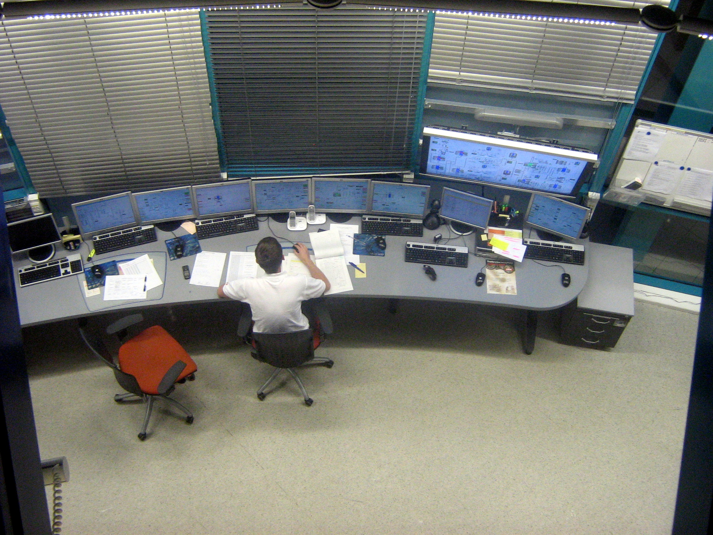 W pełni skomputeryzowana sterownia warzelni